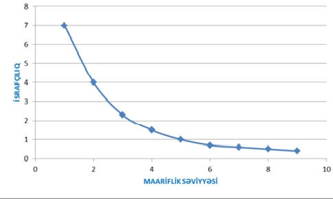 Maarifçilik səviyyəsi ilə israfçılıq arasında asılılıq